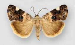 Acontia geminocula female